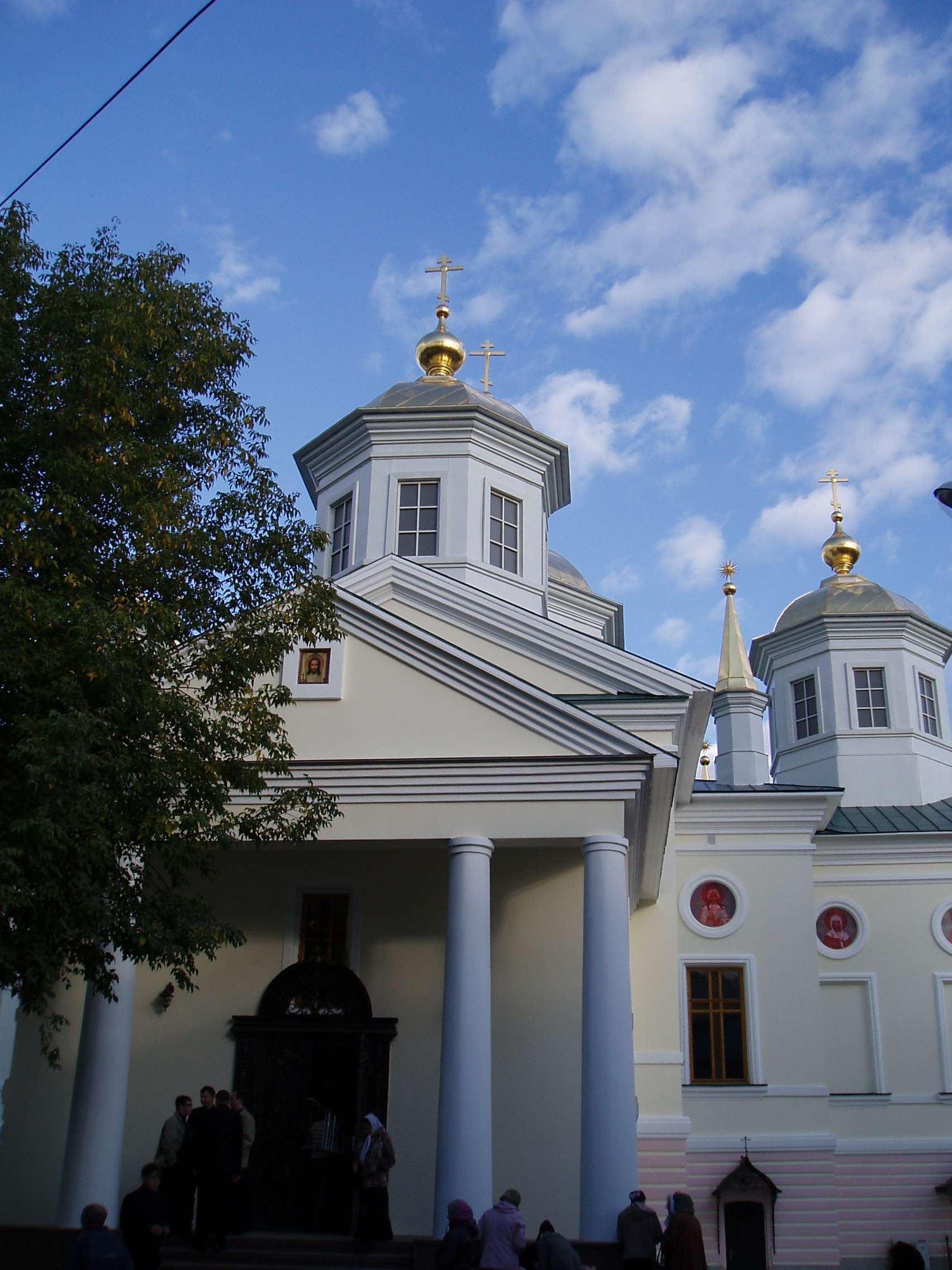 Вход в Крестовоздвиженский собор